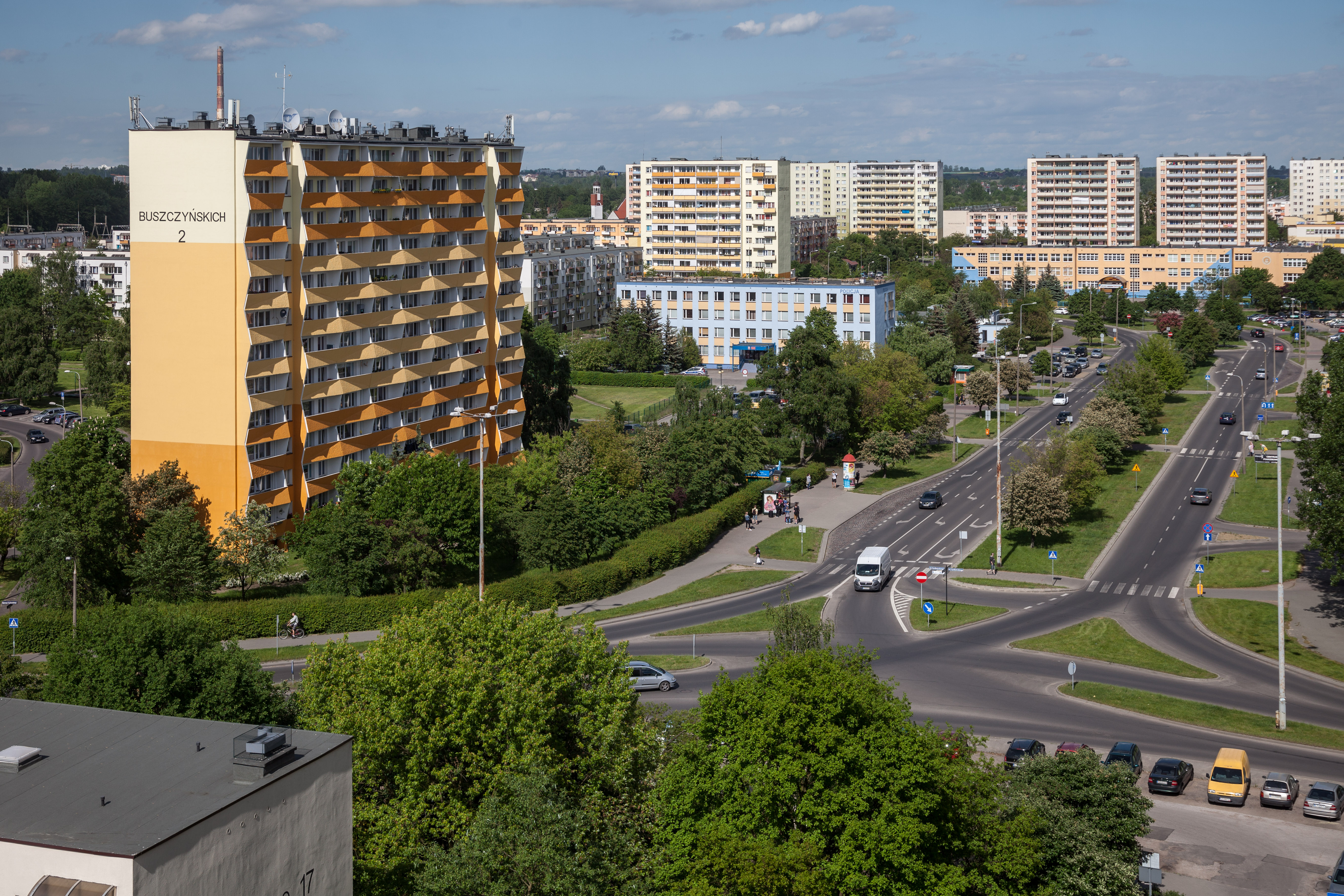 Rubinkowo, widok na ul. Dziewulskiego z bloku przy ul. Łyskowskiego 13.